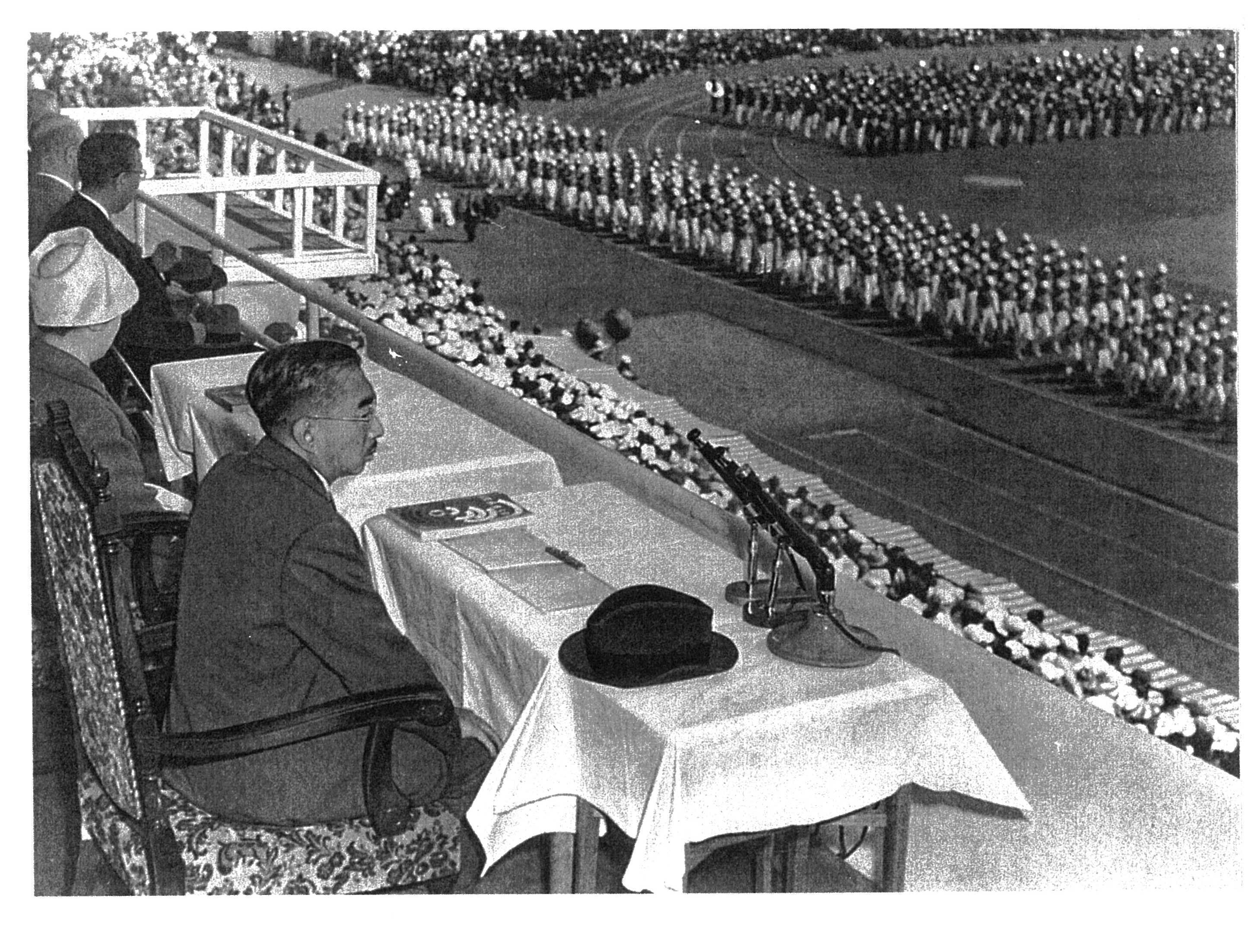 第15回国民体育大会秋季大会の開会式を参観される天皇と皇后